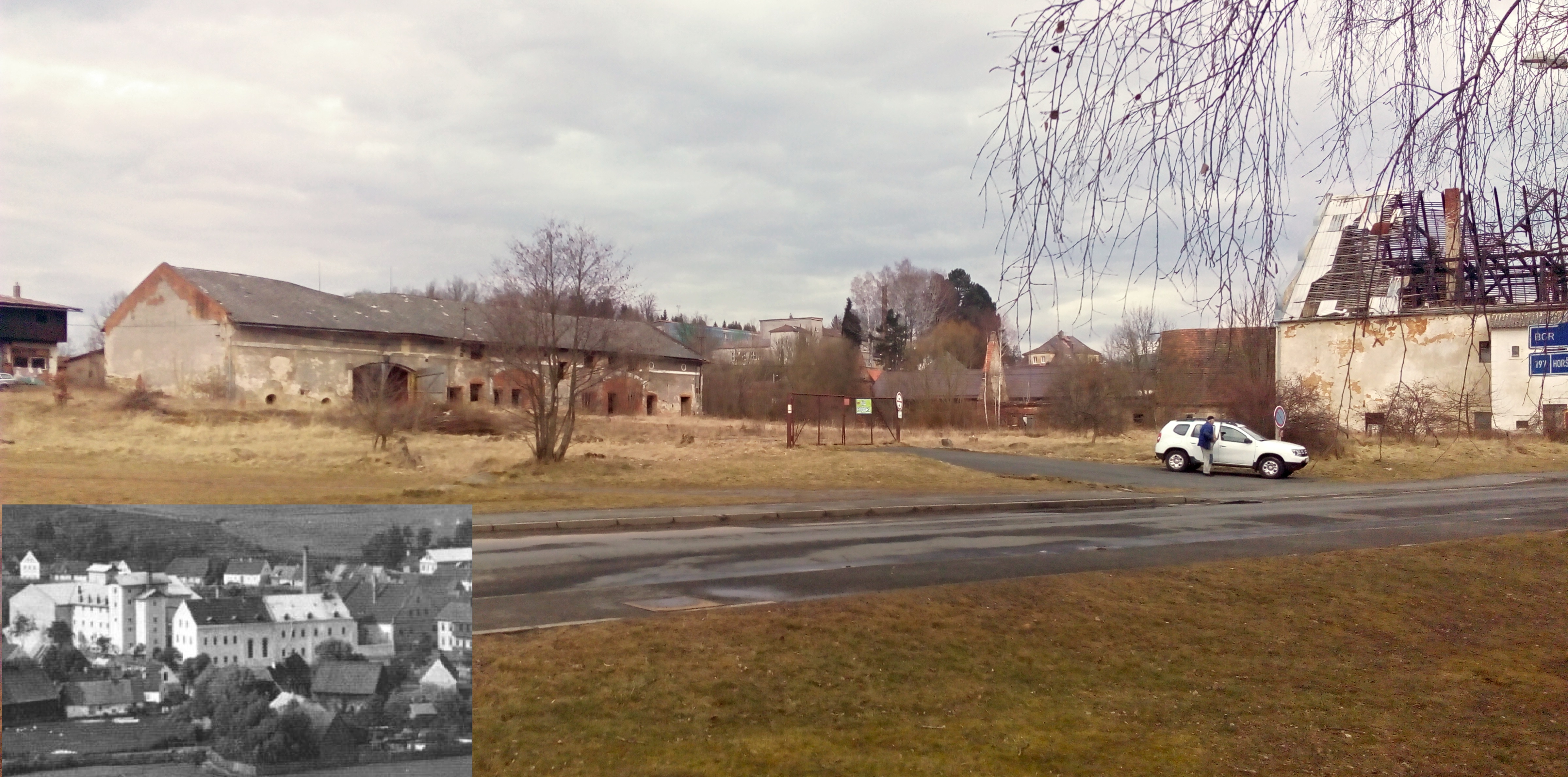 Místo, kde stál pivovar V Bělé nad Radbuzou a v levém rohu pro představu fotografie pivovaru z počátku 20. století